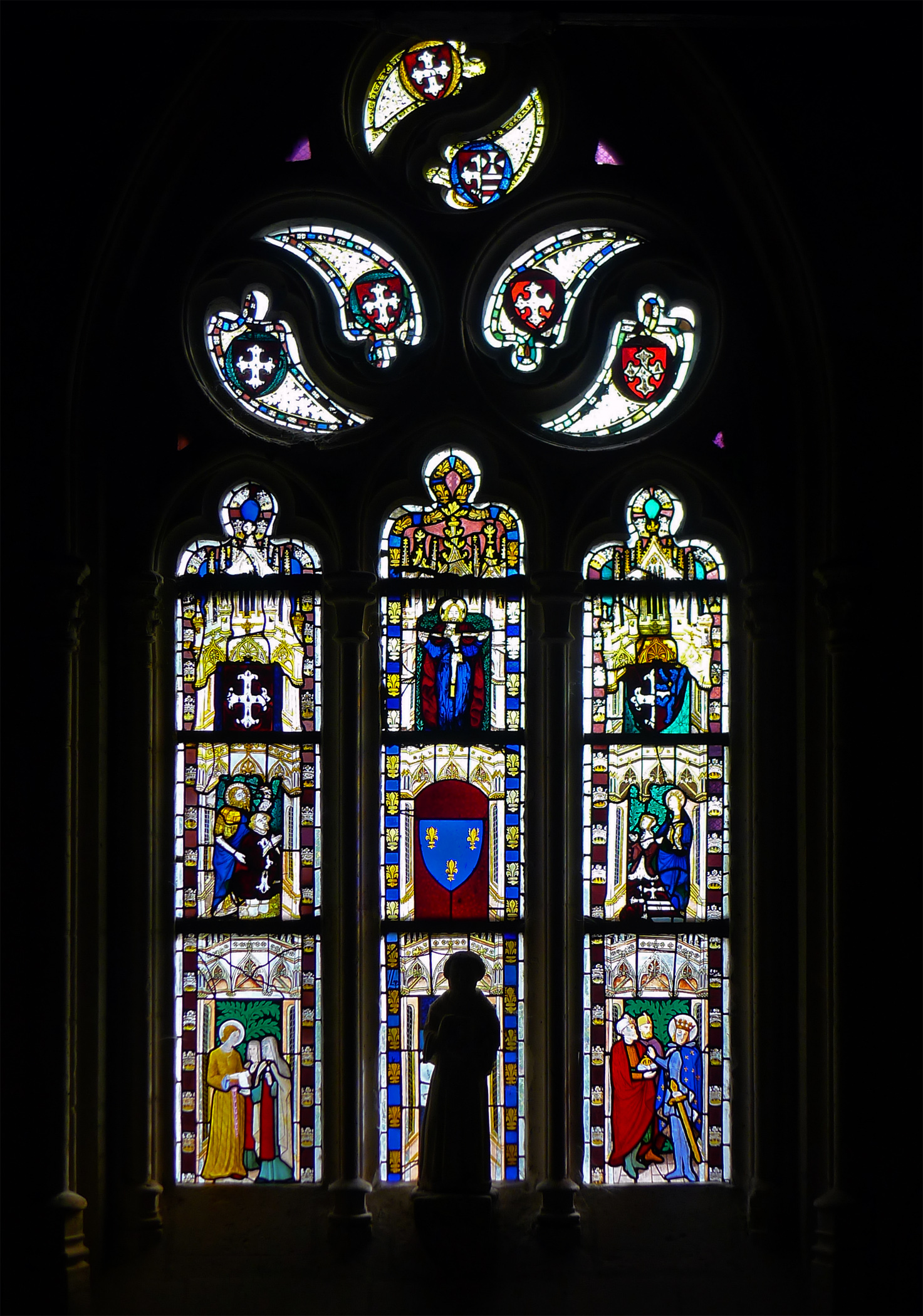 Église Notre-Dame de Béhuard, Maine-et-Loire, Pays de la Loire, France Vitrail .